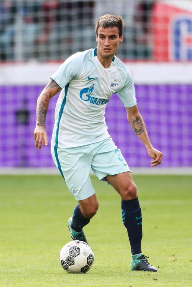 16.08.2017. Нидерланды, Утрехт, стадион «Галгенвард». Лига Европы УЕФА 2017/2018, 4 кв. раунд, "Утрехт" - Зенит".